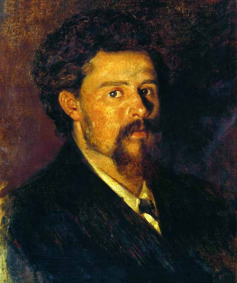 Self-portrait